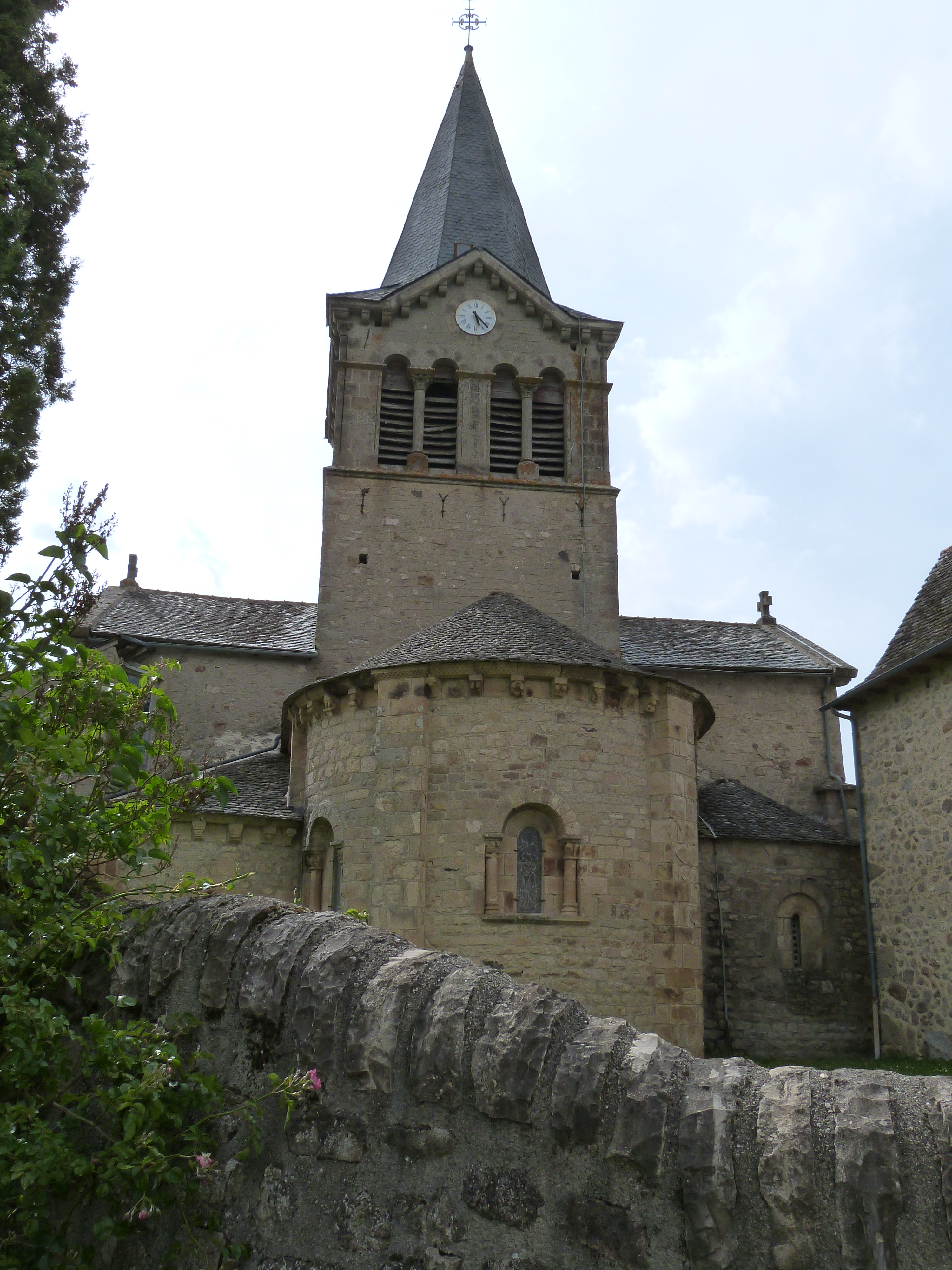 Église Saint-Jean-Baptiste (Inscrit) .